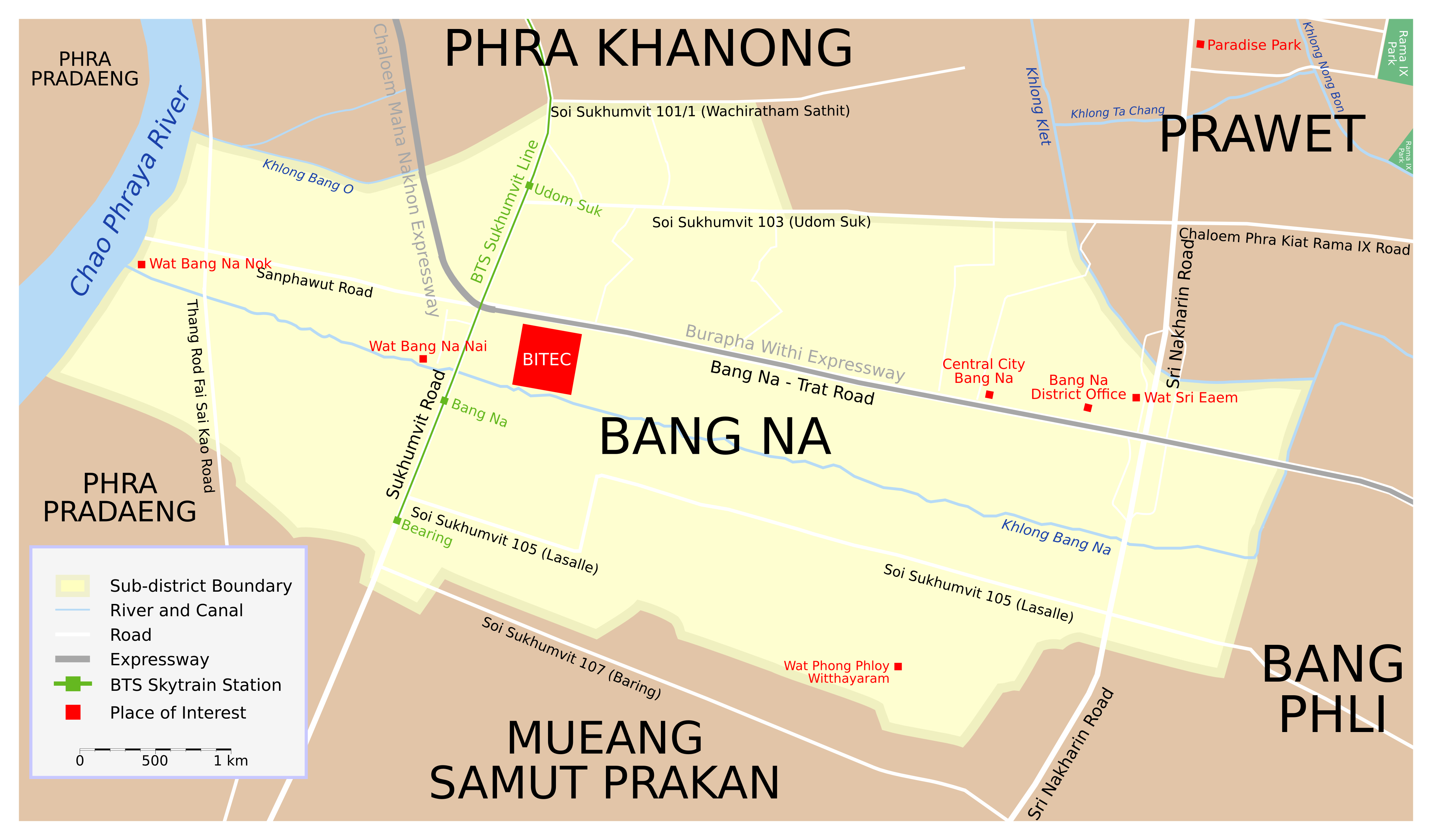 Map of Bang Na District, Bangkok.